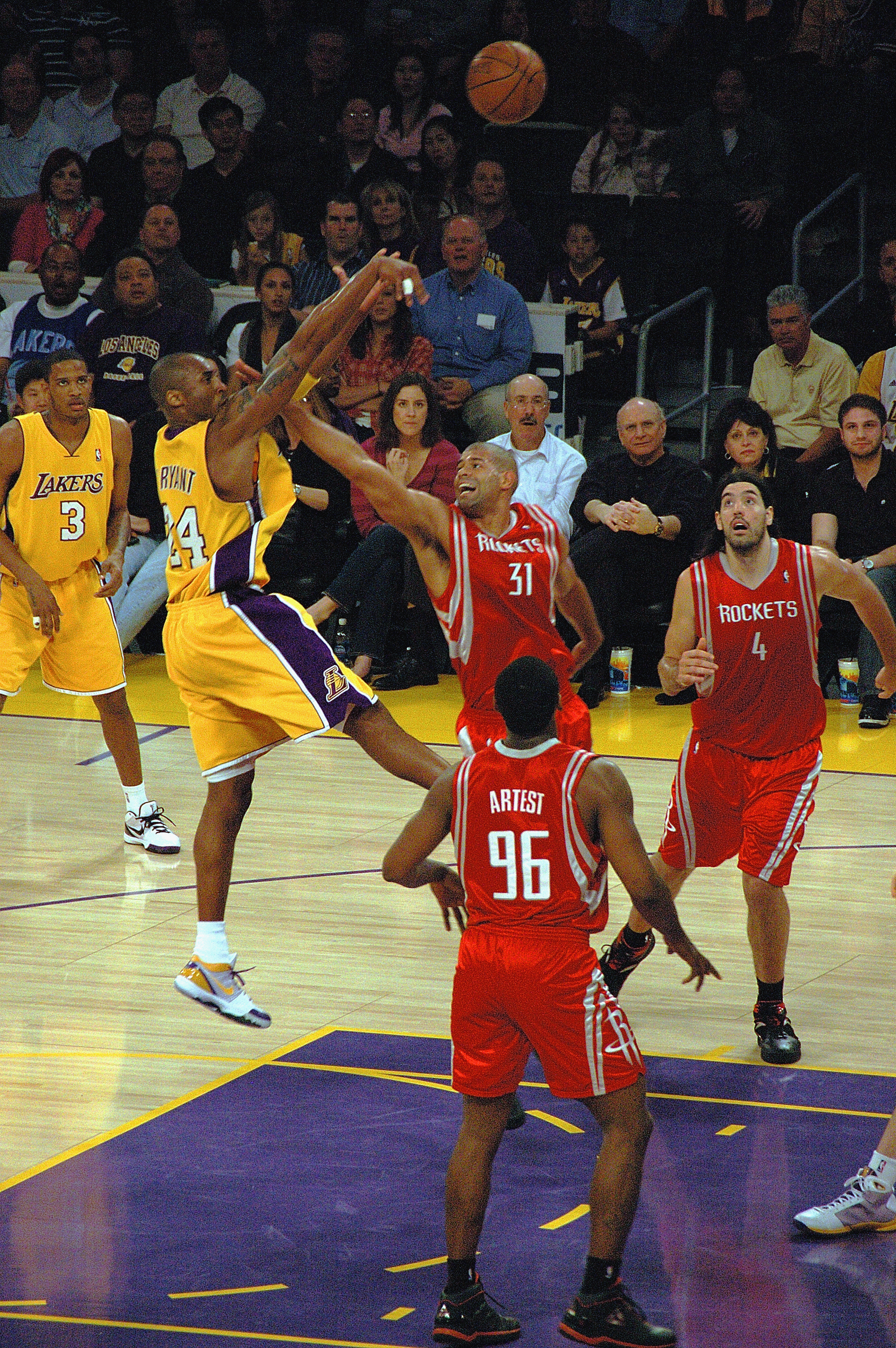 kb_0563cf